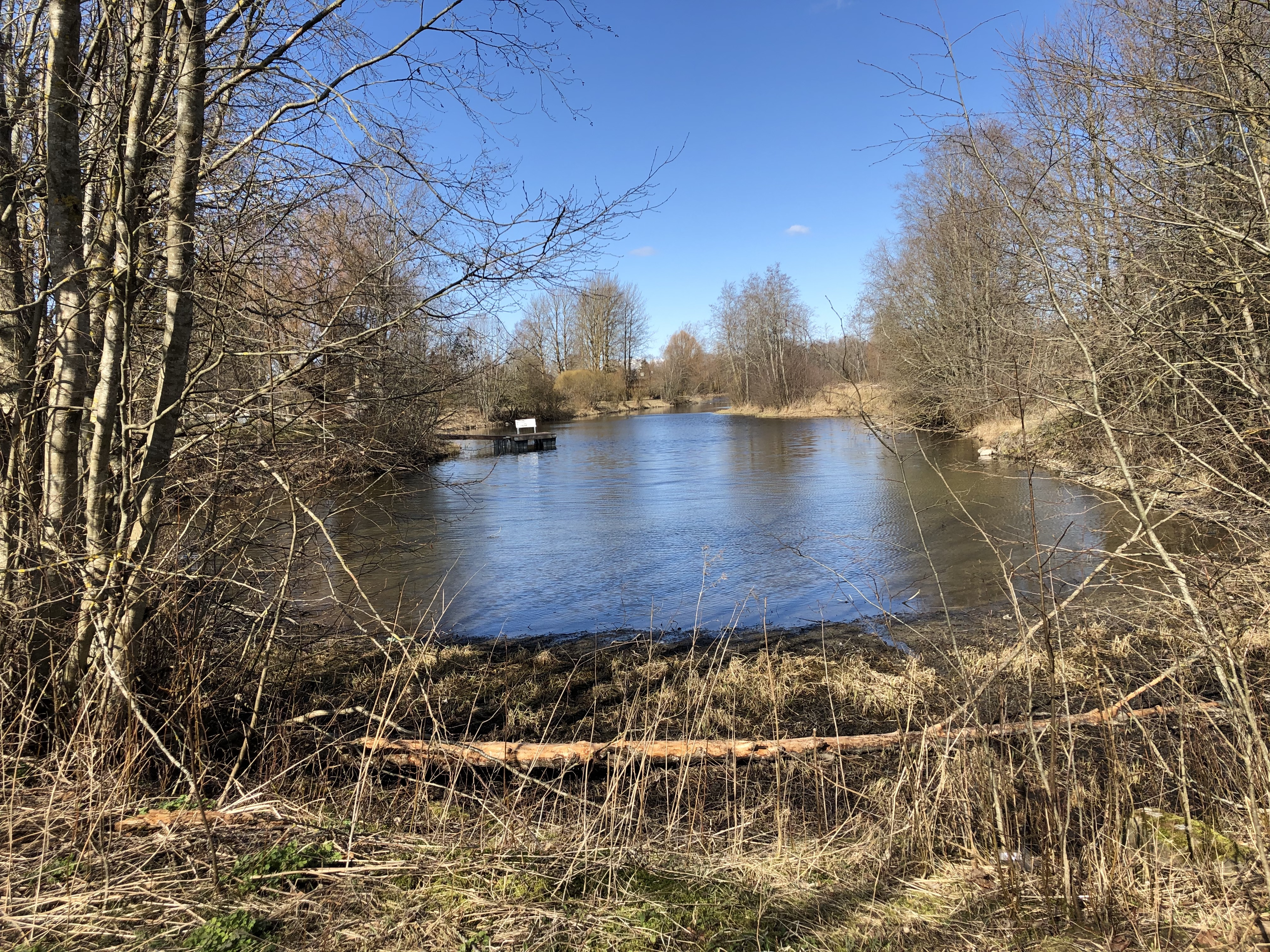 Järv Paeknas